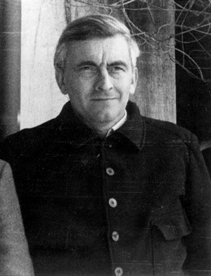 Foto von Karl Neupert (Ausschnitt aus einem Gruppenbild)